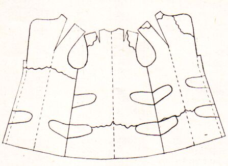 Foalskins-coat with 5 sets of flowers in the body / Beispiel für eine Fohlenfellverarbeitung mit 5 (Ross-)Spiegeln